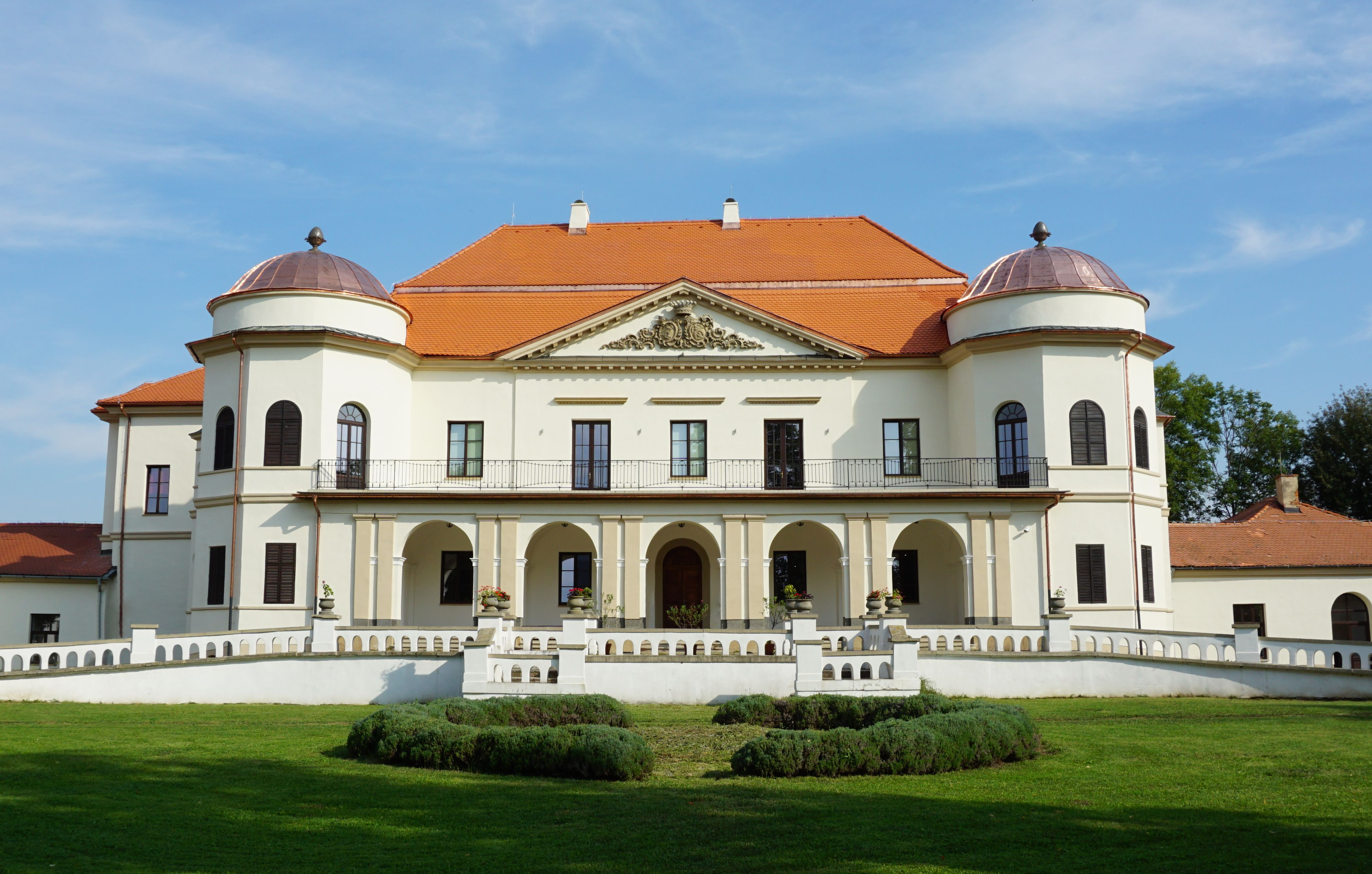 Zemplínske múzeum